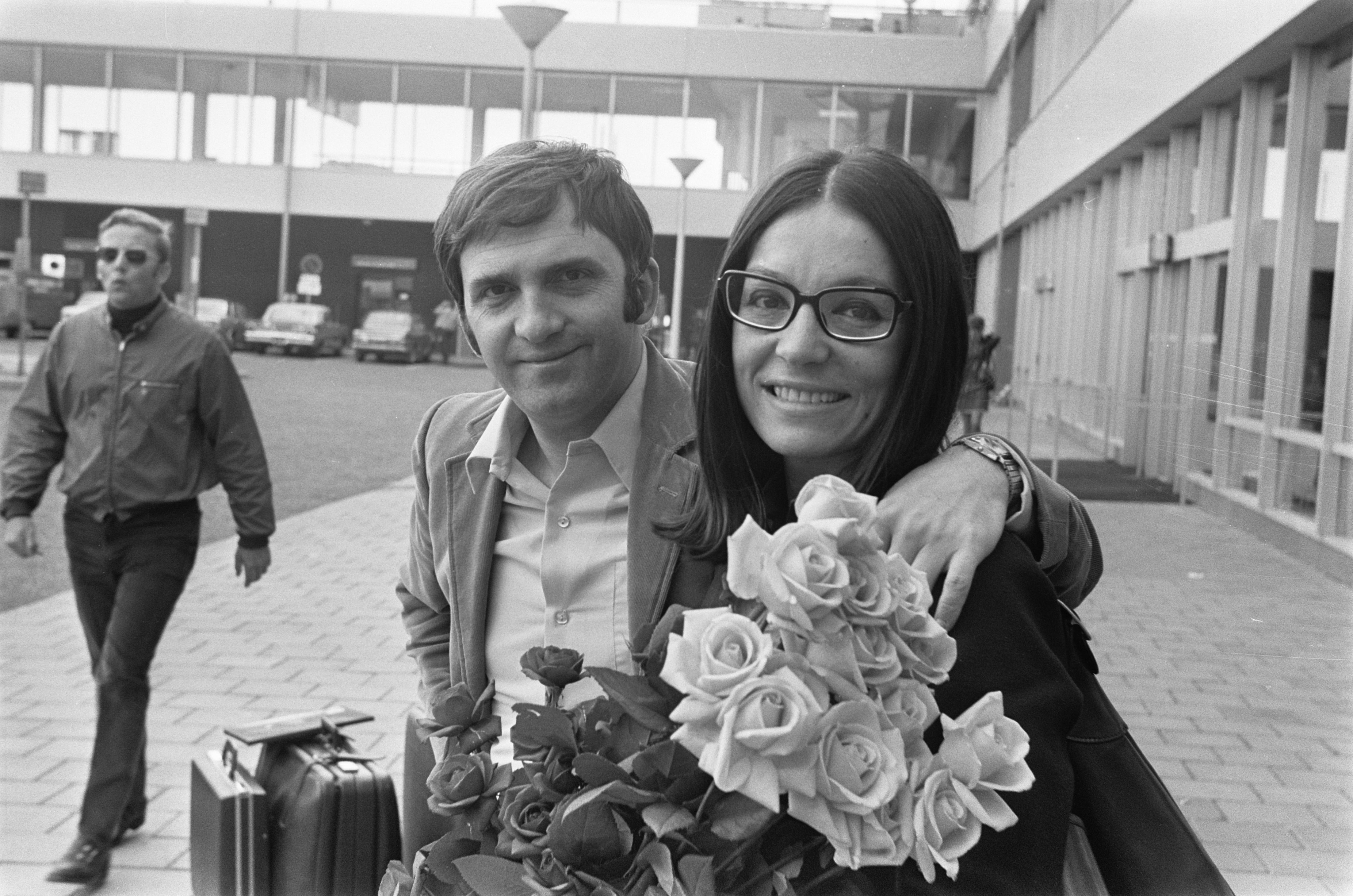 Collectie / Archief : Fotocollectie Anefo Reportage / Serie : [ onbekend ] Beschrijving : Grieks Franse zangeres Nana Mouskouri met echtgenoot George Petsilas op Schiphol Nana Mouskouri met echtgenoot Datum : 30 mei 1969 Trefwoorden : zangeressen Persoonsnaam : Mouskouri, Nana Fotograaf : Evers, Joost / Anefo Auteursrechthebbende : Nationaal Archief Materiaalsoort : Negatief (zwart/wit) Nummer archiefinventaris : bekijk toegang 2.24.01.05 Bestanddeelnummer : 922-4743